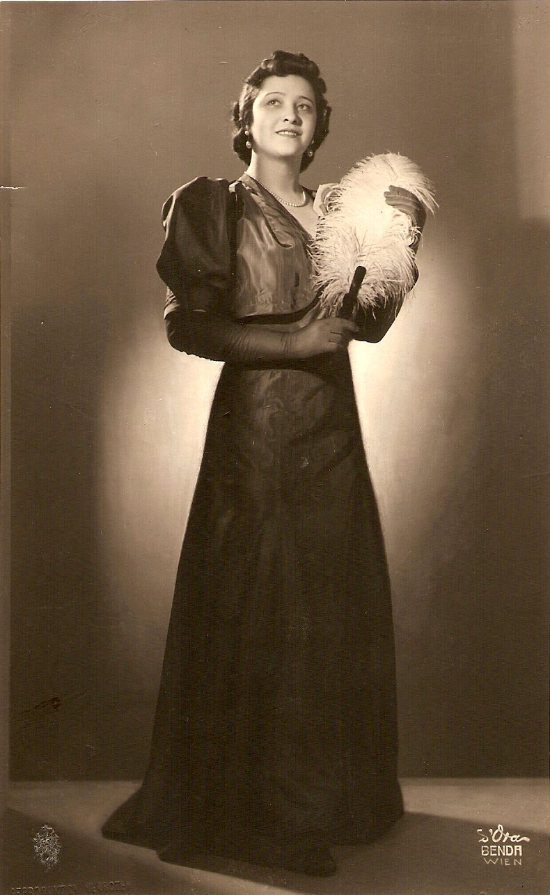 Opernsängerin Maria von Guggenberg–Barska